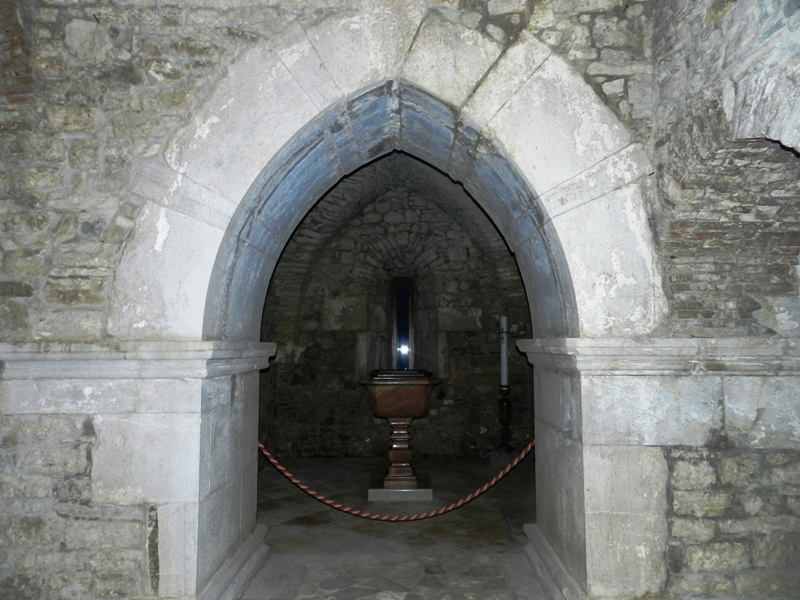 La chiesa di Santa Maria dei Greci (XI secolo) a Molinara, in provincia di Benevento